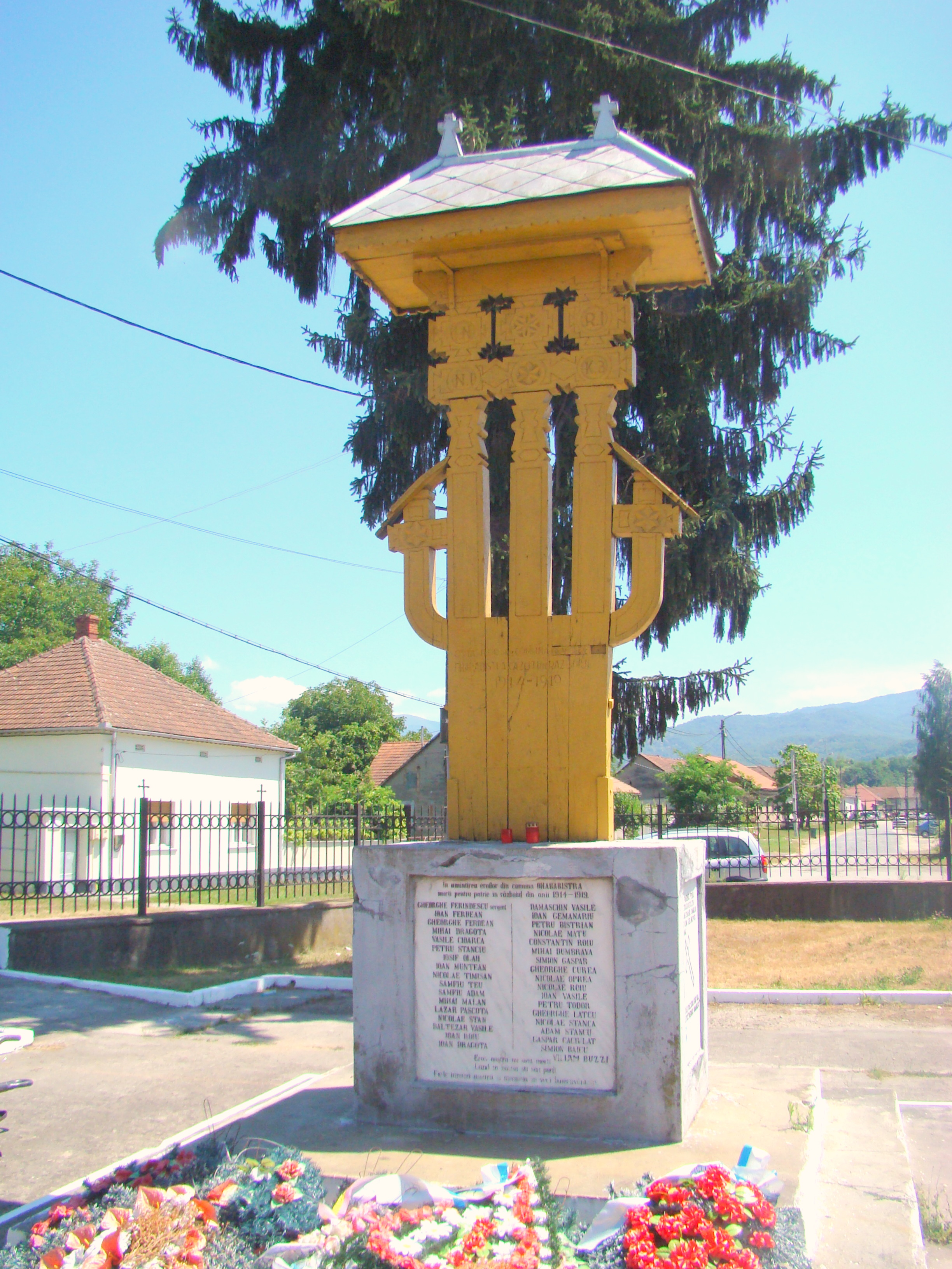 Troița Eroilor (1914-1918), oraș Oțelu Roșu, Str. Cuza Alexandru Ioan 40 02